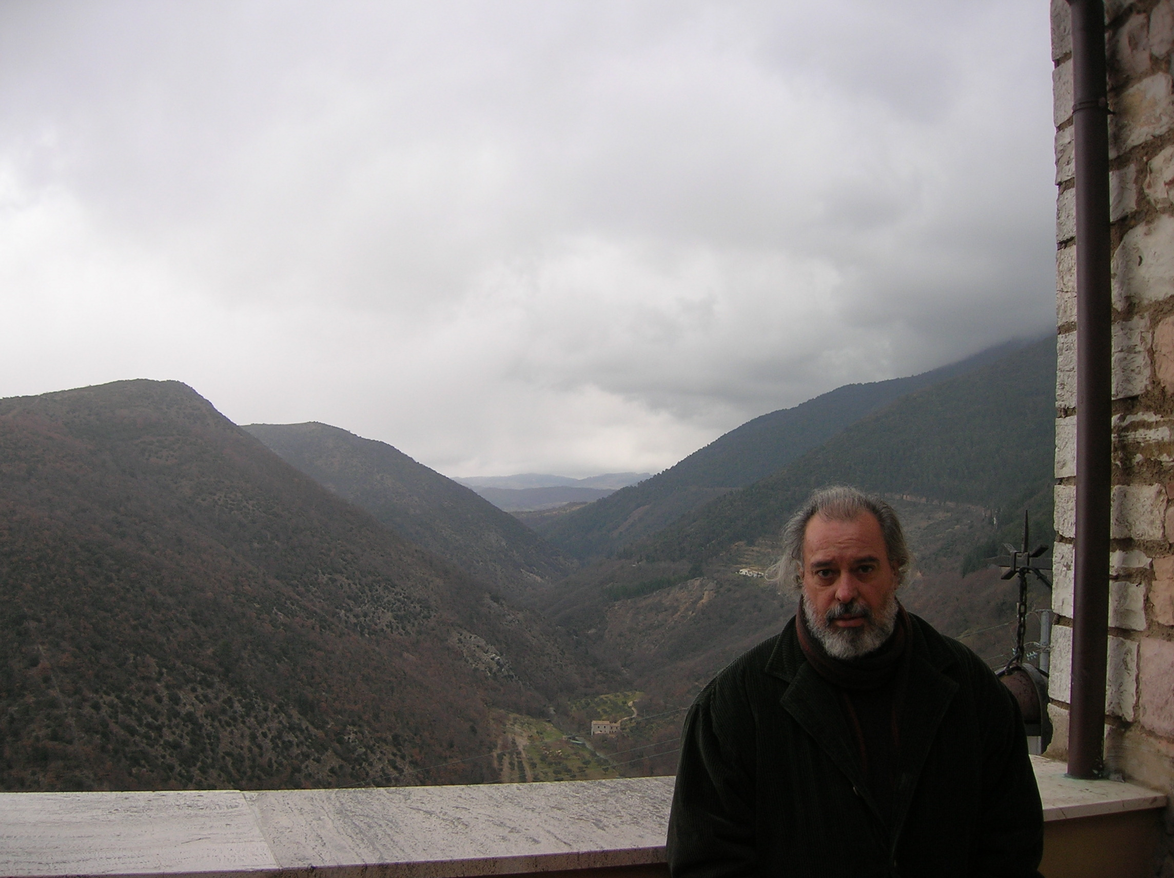 O poeta brasileiro Carlos Lima é autor de vários livros e também é professor da UERJ. Nesta foto, está em Assis, Itália.